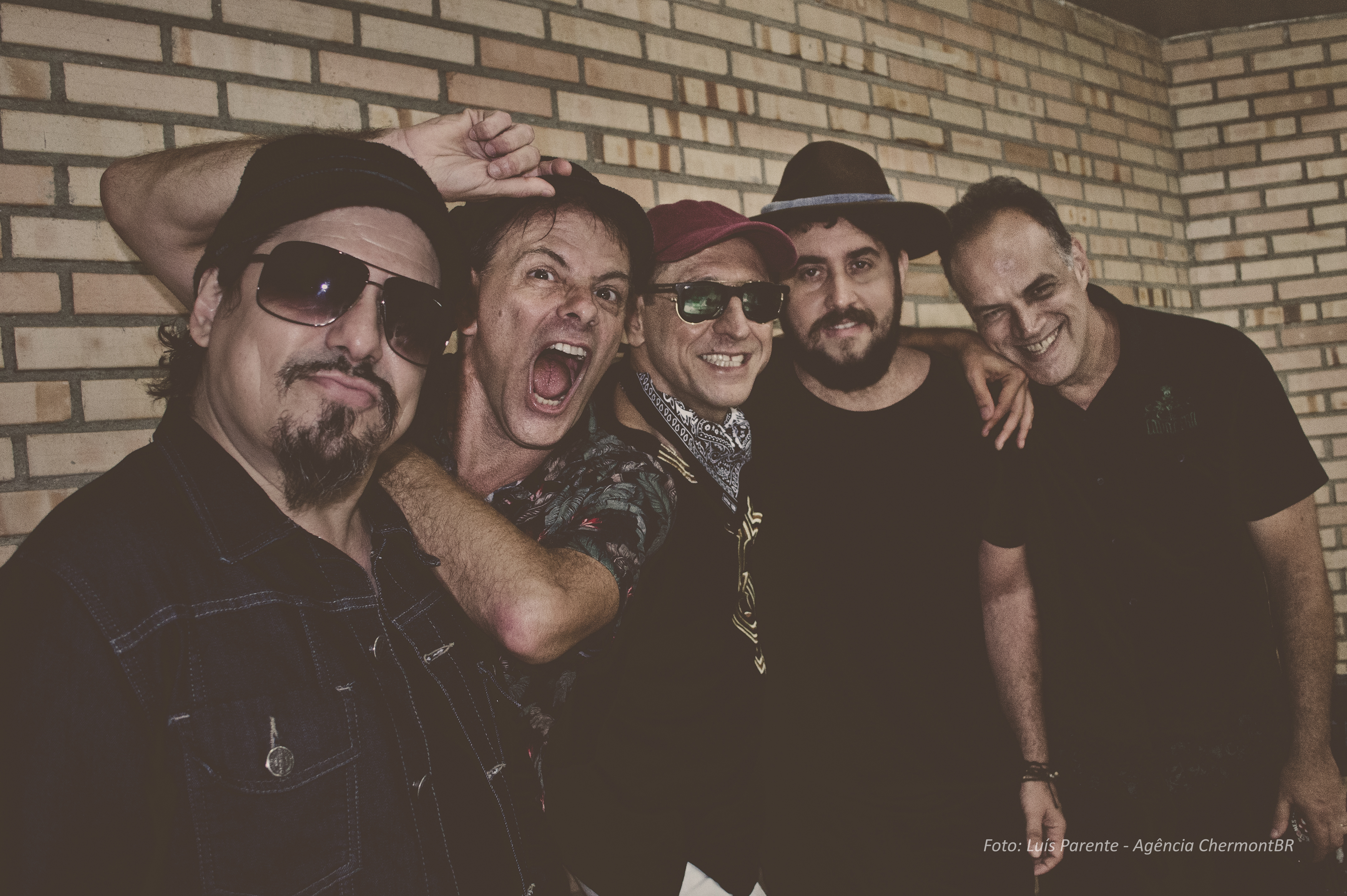 Português do Brasil: Formação do Barão Vermelho 2017 . Mauricio Barros, Rodrigo Santos, Guto Goffi, Rodrigo Suricato e Fernando Magalhães